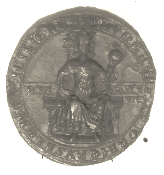 Pečeť KOnráda IV. Štaufského